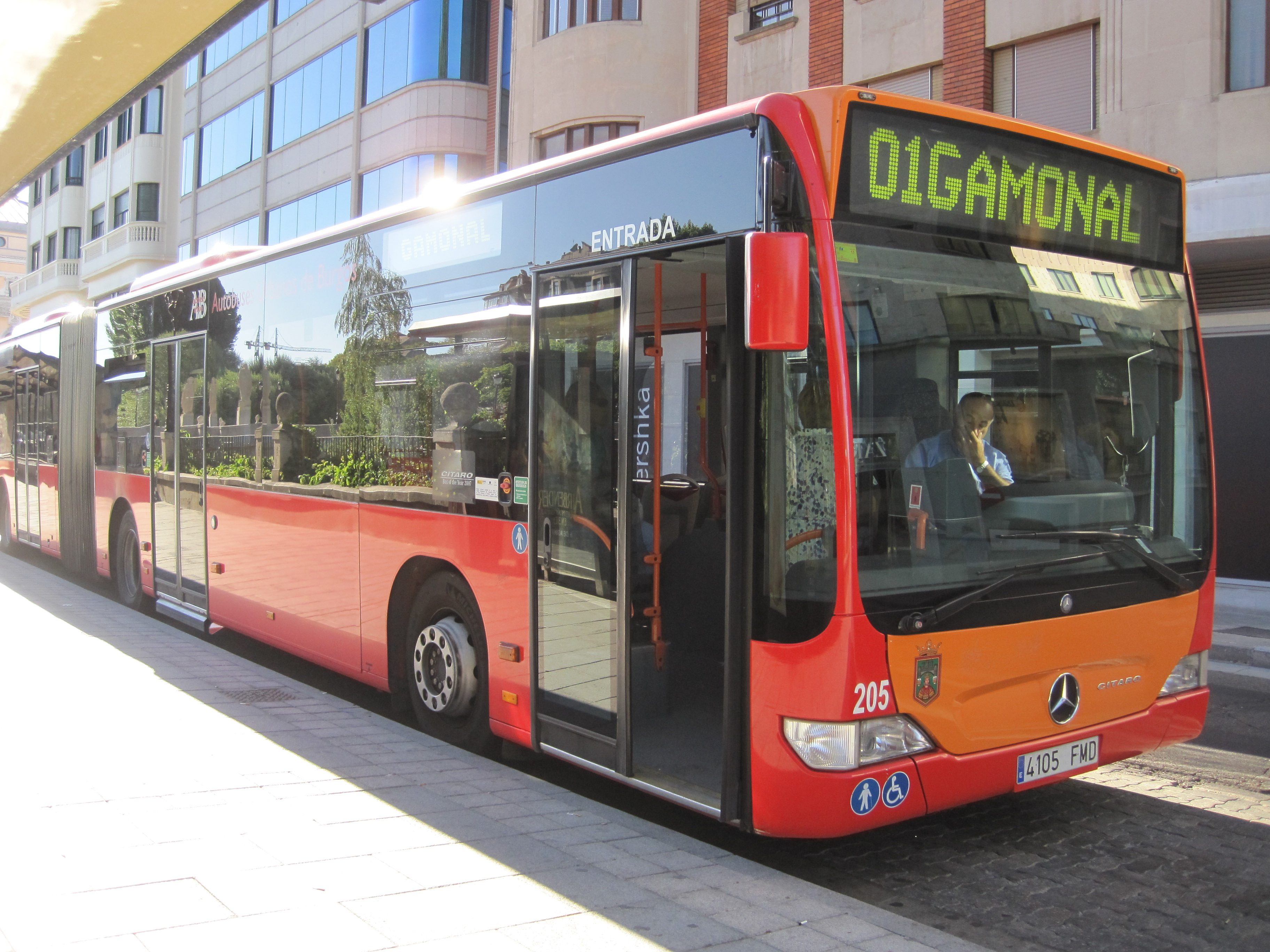 Vista del bus de la Línea 1 de Burgos.